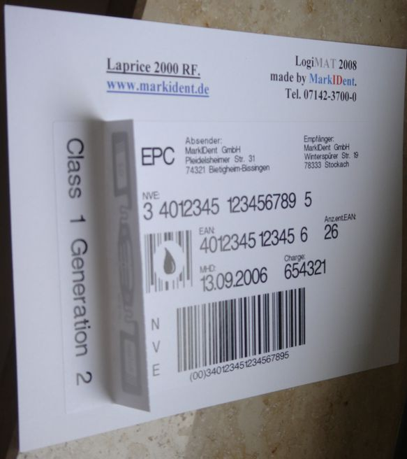 FlagTag-Label